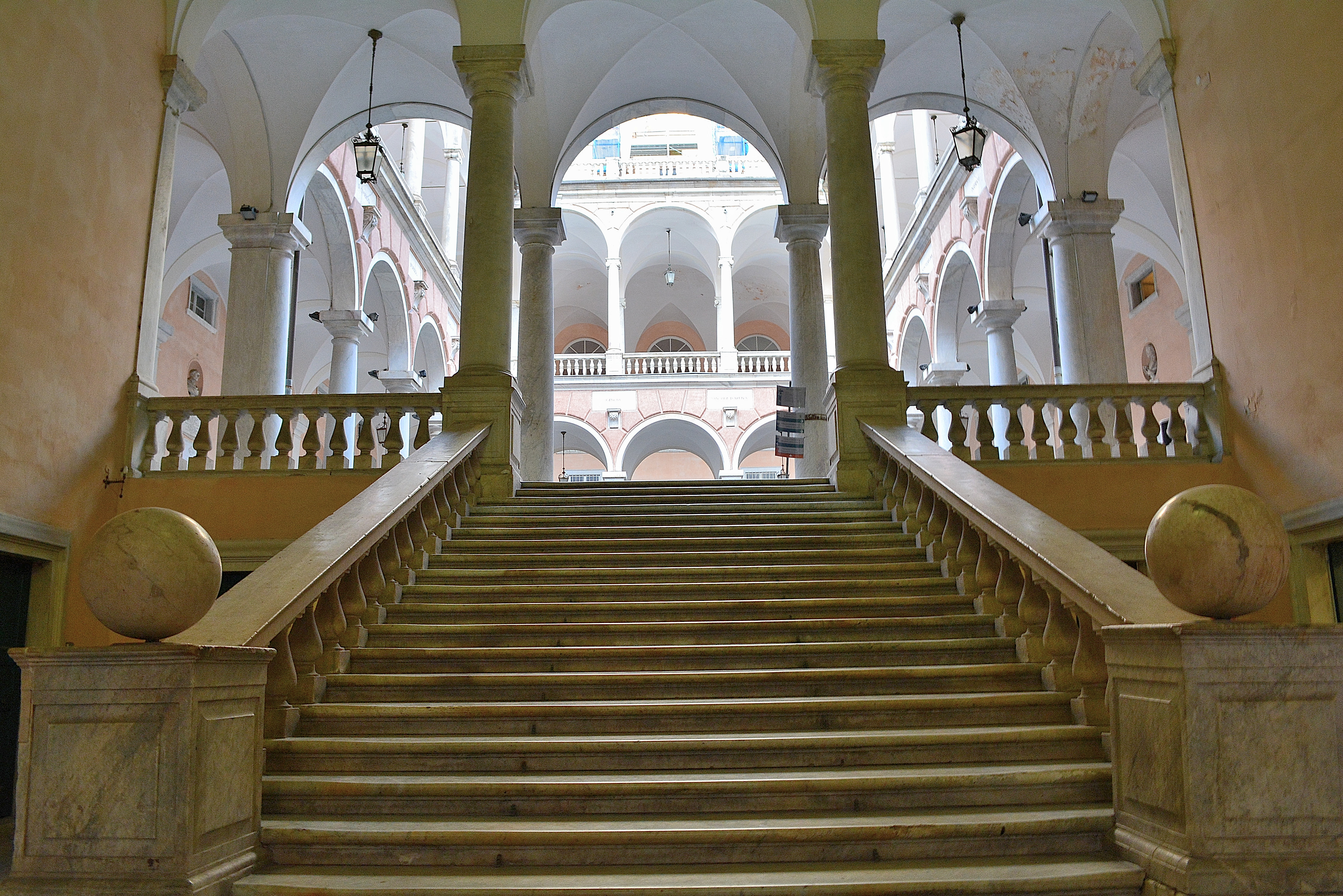 Palazzo Doria-Tursi - Musei di Strada Nuova This is a photo of a monument which is part of cultural heritage of Italy.